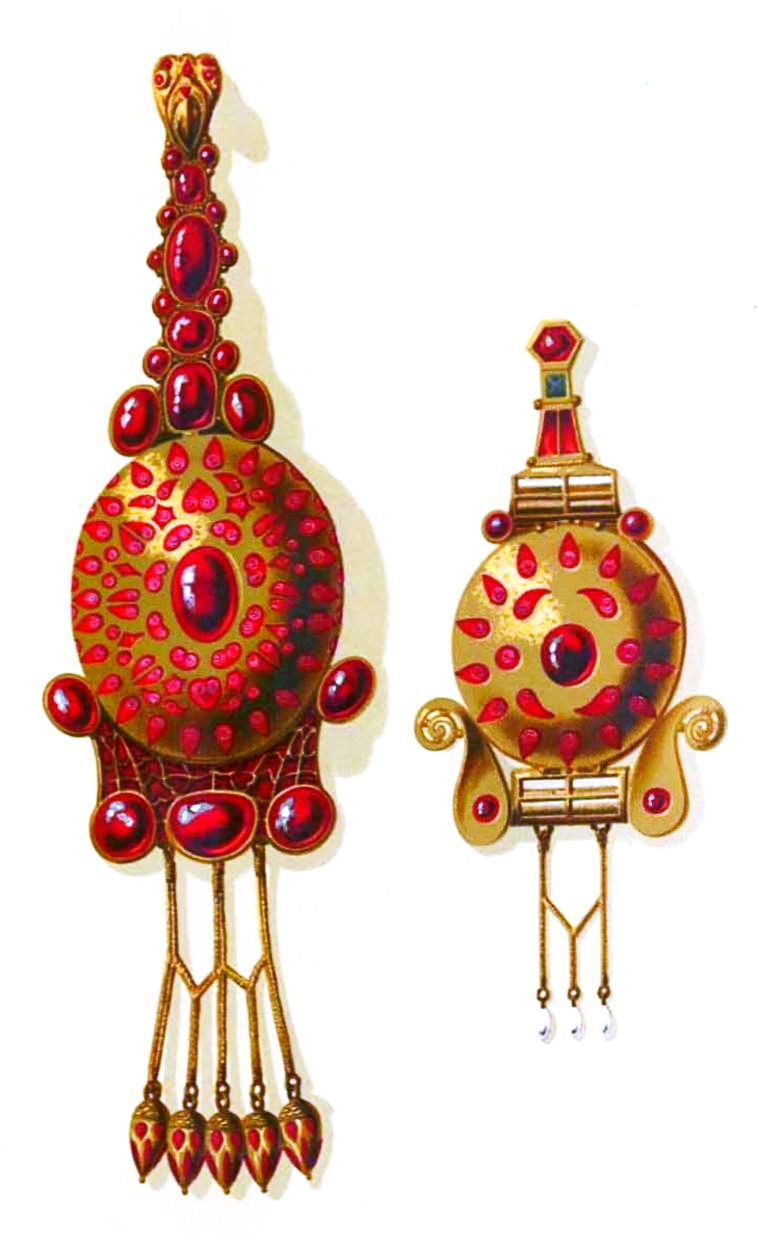 Fibula mijlocie si cea mica - reproducere Alexandru Odobescu